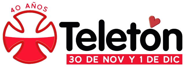 Teletón 2018